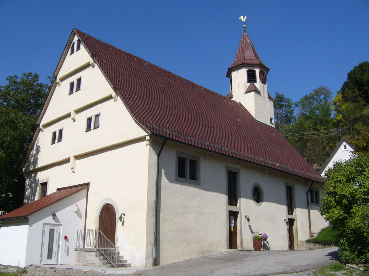 Die evangelische Heilig-Kreuz-Kirche in Reusten